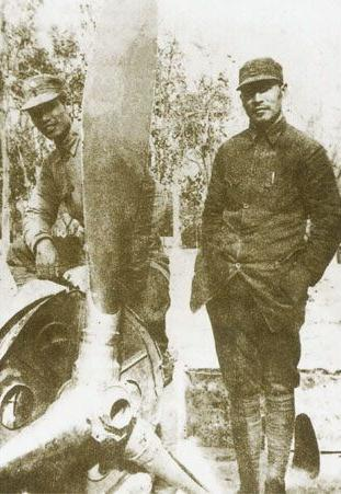 1940年，彭雪枫与张震在日军飞机残骸前留影